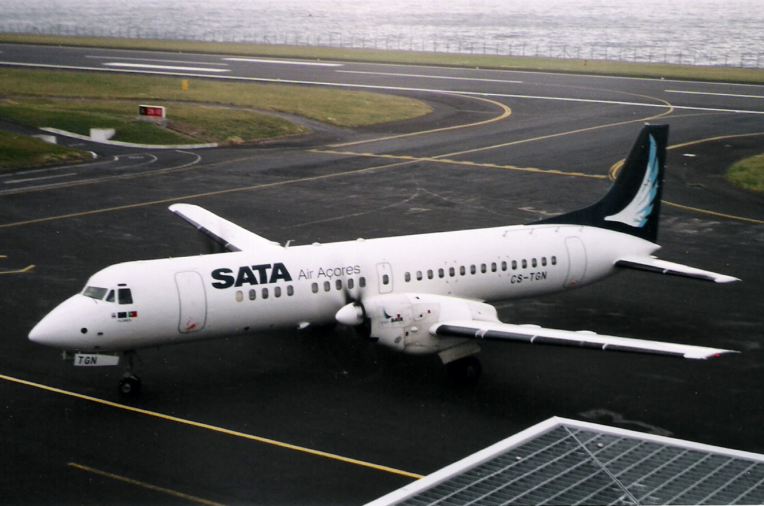 ATP da SATA Air Açores